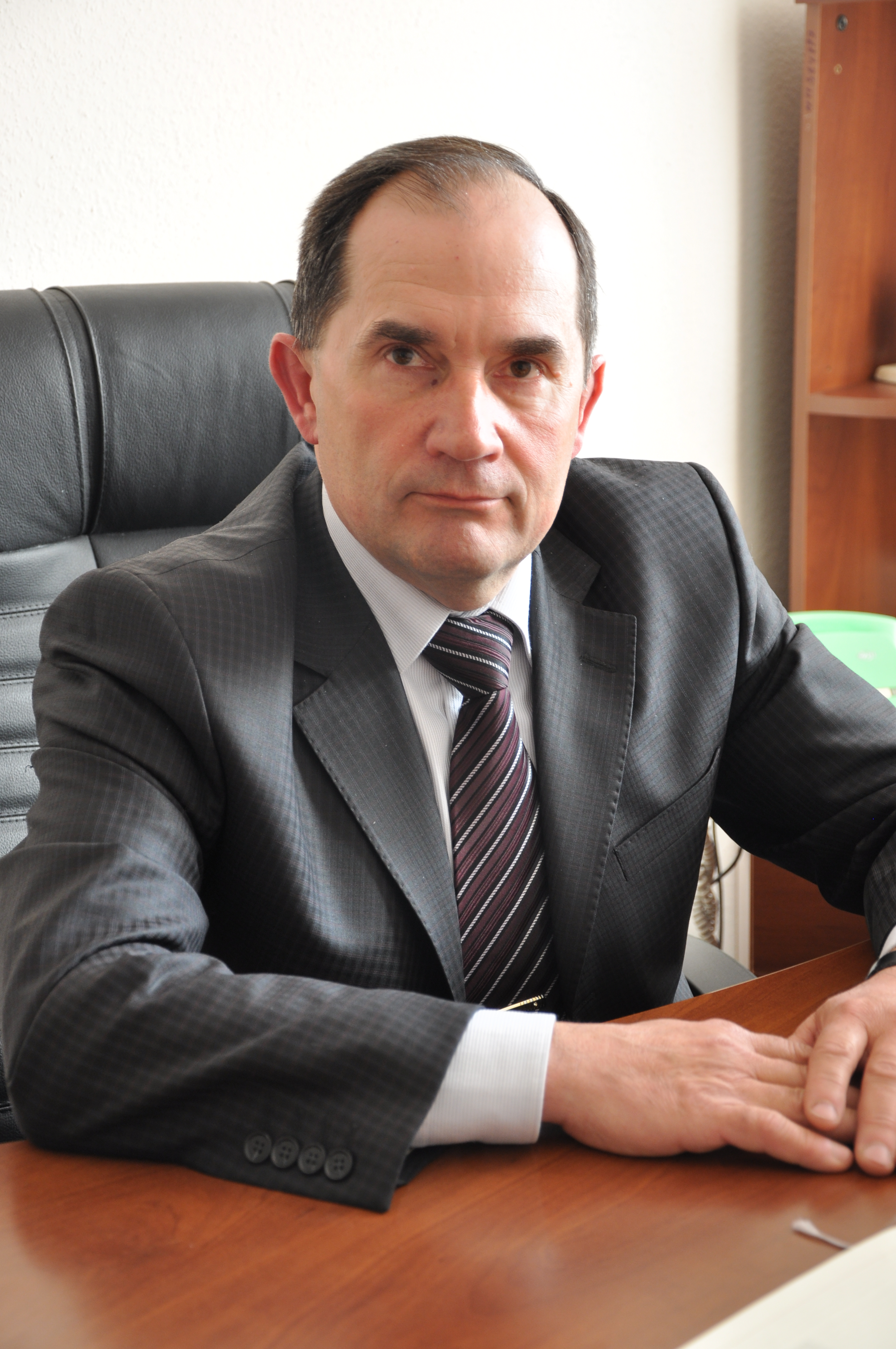 портрет